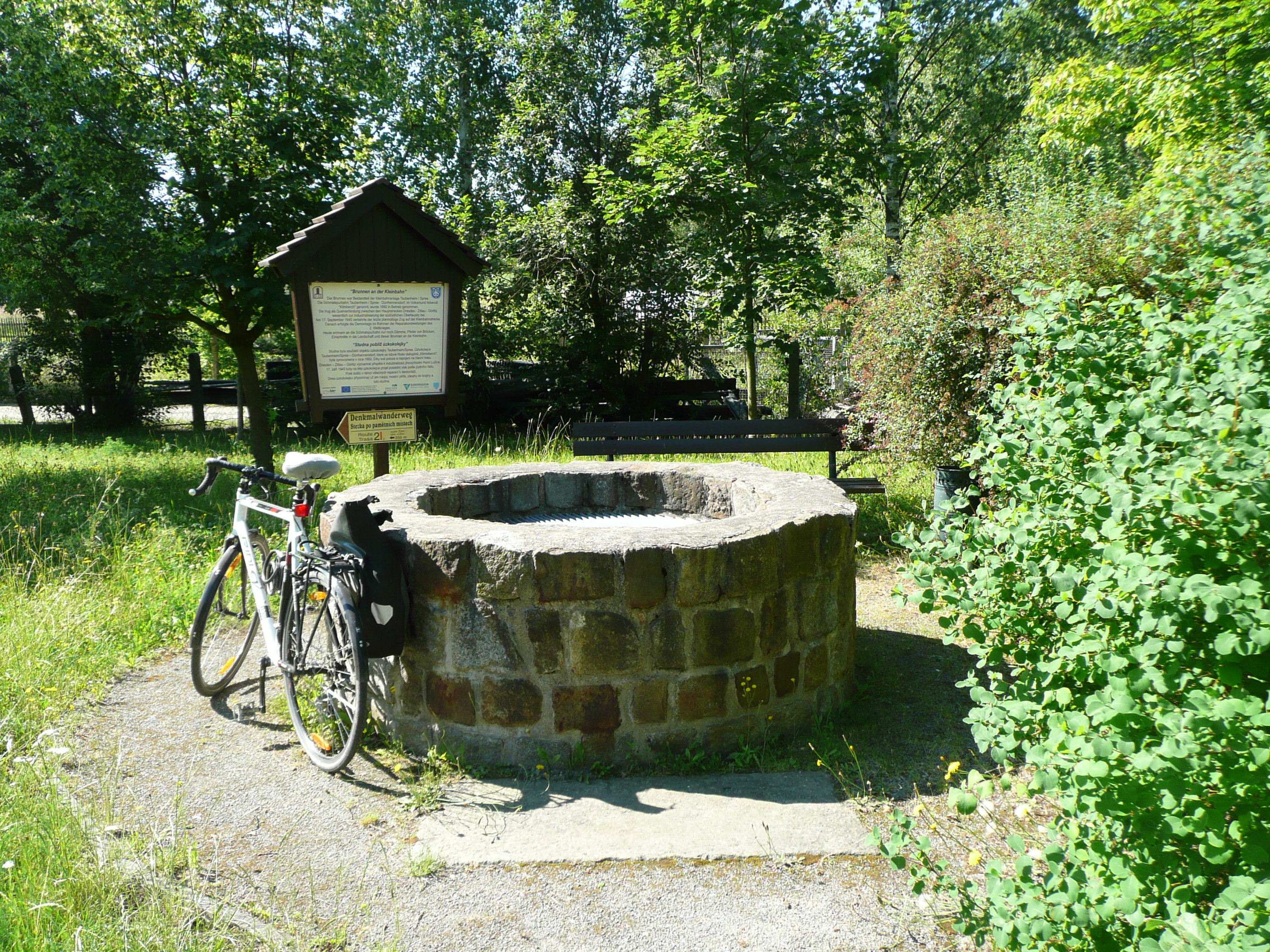 Brunnen bei dem ehemaligen Lokschuppen in Taubenheim